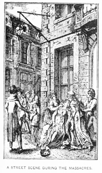 Scène de rue durant les massacres